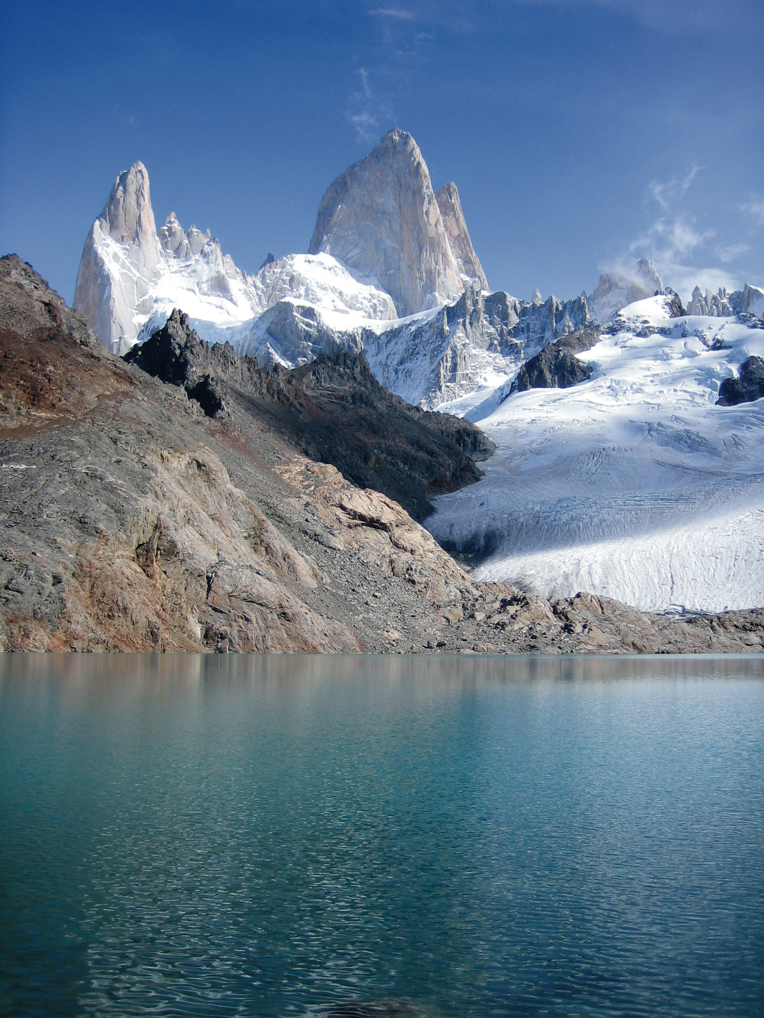 Von mir selbst aufgenommen und unter Public Domain gestellt. Bearbeitung von image:Fitz_Roy_1.jpg durch Rainer Zenz